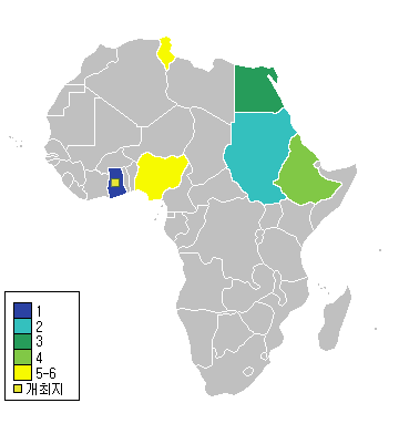 1963년 아프리카 네이션스컵 정보